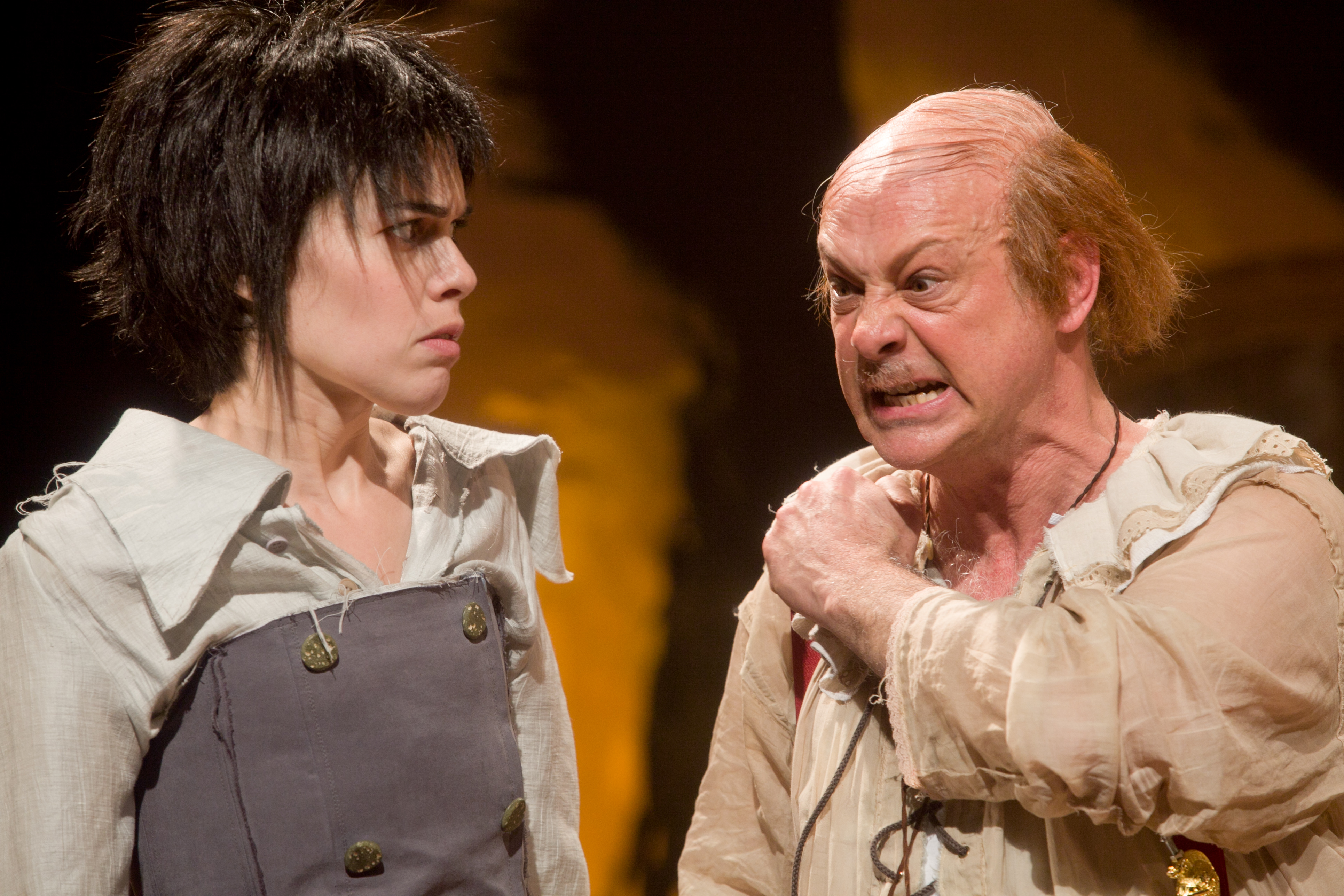 הלילה השנים עשר, תיאטרון החאן